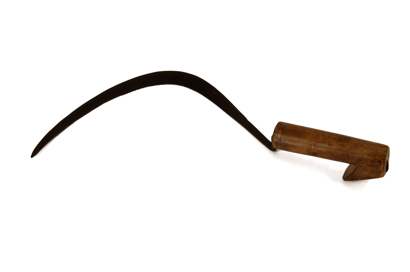 Fotografies dels objectes de l'exposició permanent de la sala "Secà i Muntanya" del Museu Valencià d'Etnologia - Fotografies de Mateo Gamon. Corbella per a segar herba.